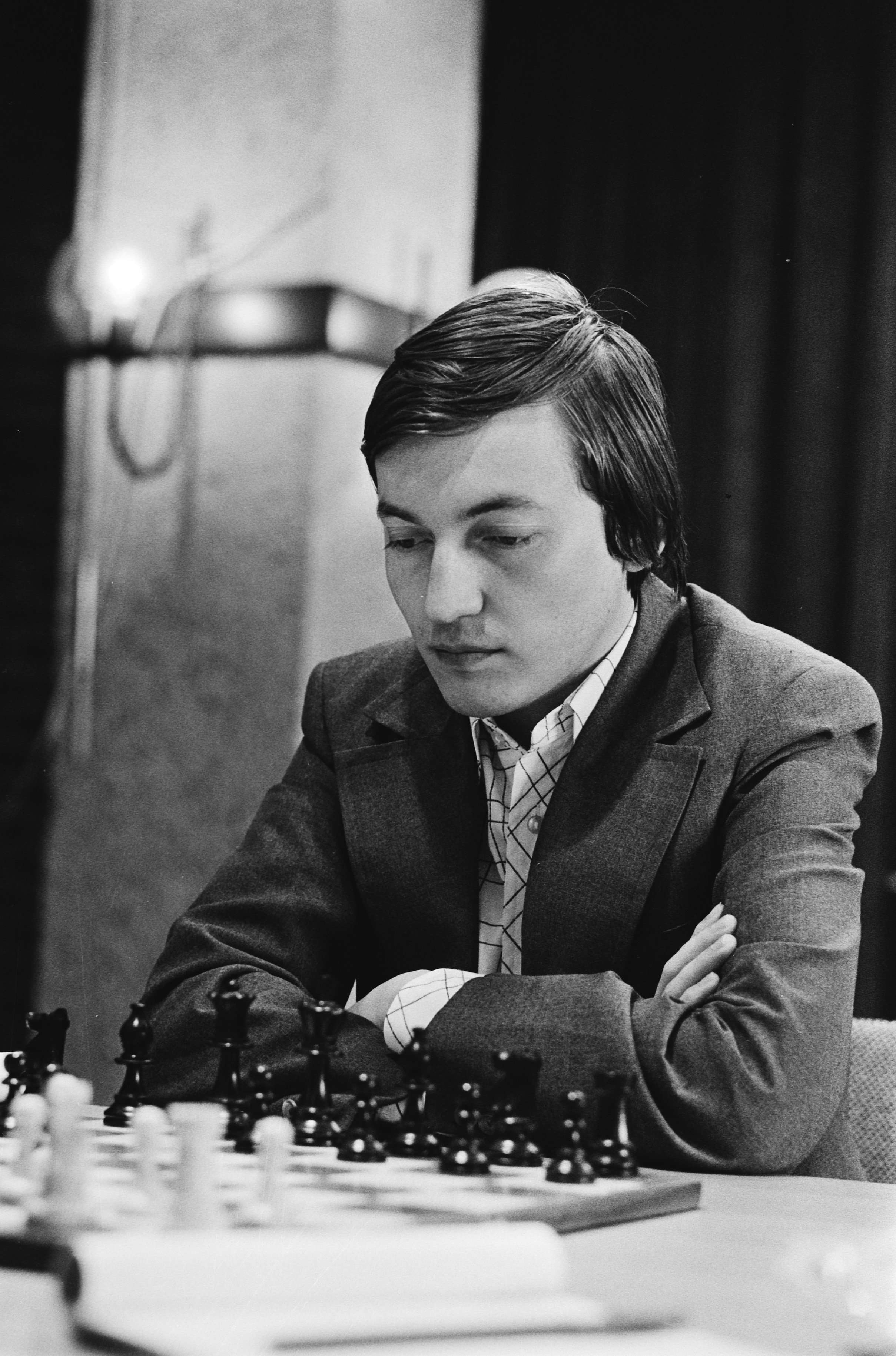 Karpov aan zet, Waddinxveen, Zuid-Holland. Kats-grootmeestervierkamp in Waddinxveen